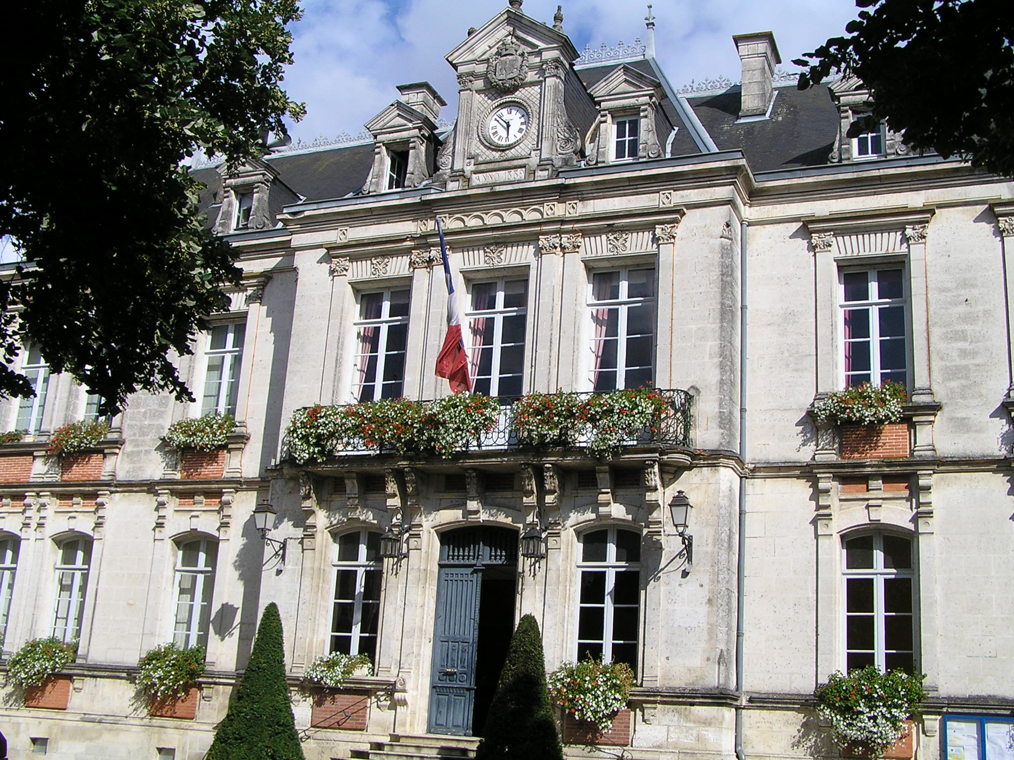 mairie de Mansle